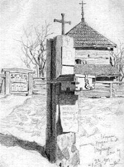 Сборная кружка в М. Тучине Вол. гу. ["Волынская губерния"] 22.03.1901